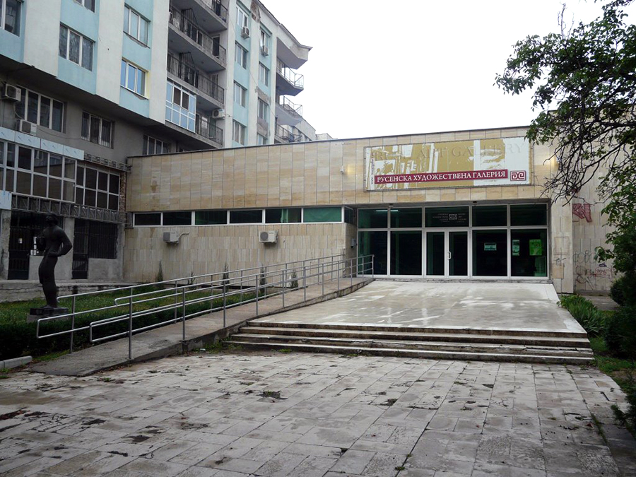 Русенска художествена галерия. Ruse art gallery